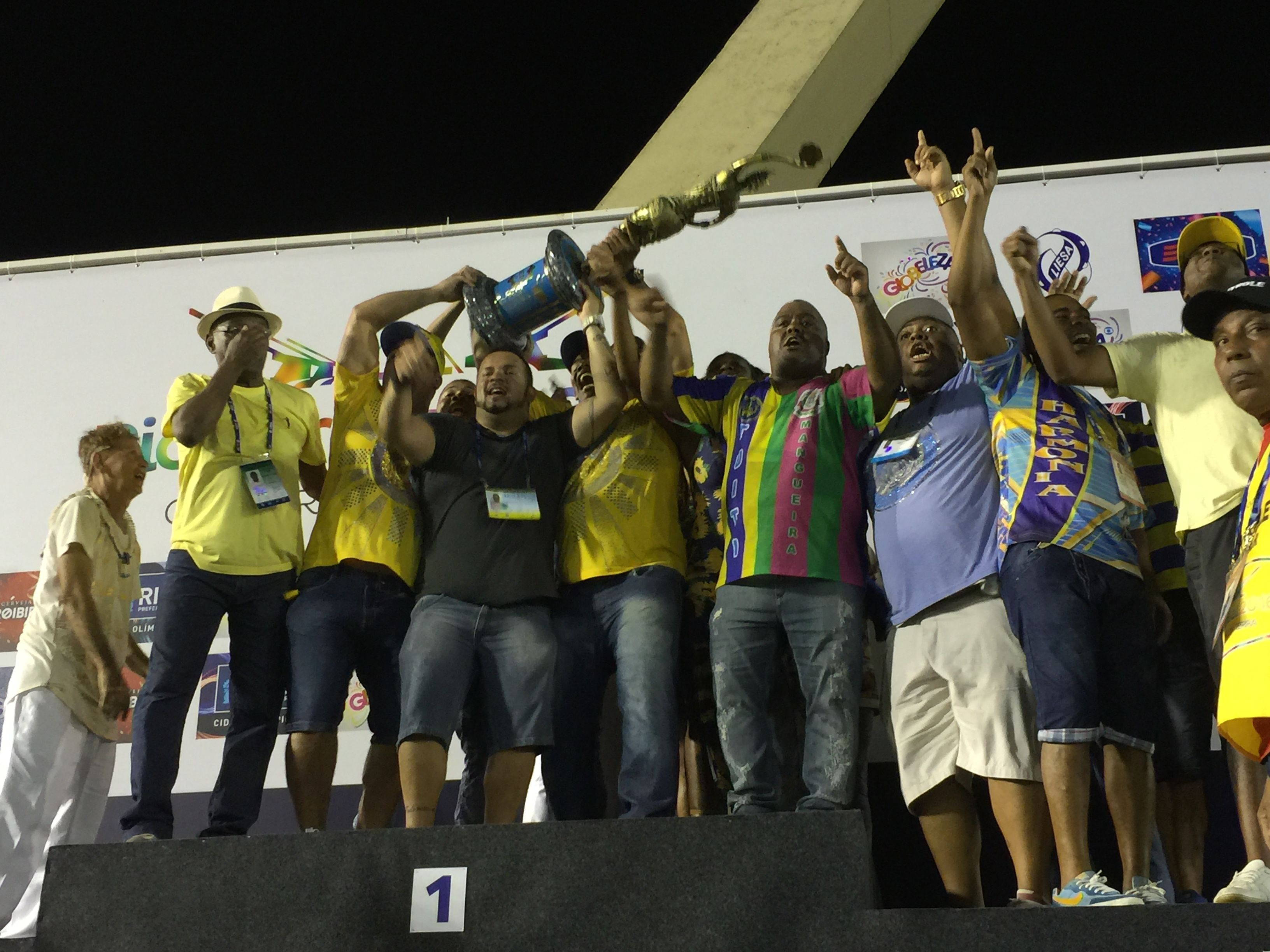 Rio de Janeiro - Integrantes da escola de samba Paraíso do Tuiuti comemoram título do Grupo A, que dá acesso ao Grupo Especial no carnaval de 2017 (Cristina Indio do Brasil/Agência Brasil)